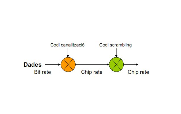 Esquema de blocs d'aplicació de codis al senyal a enviar.